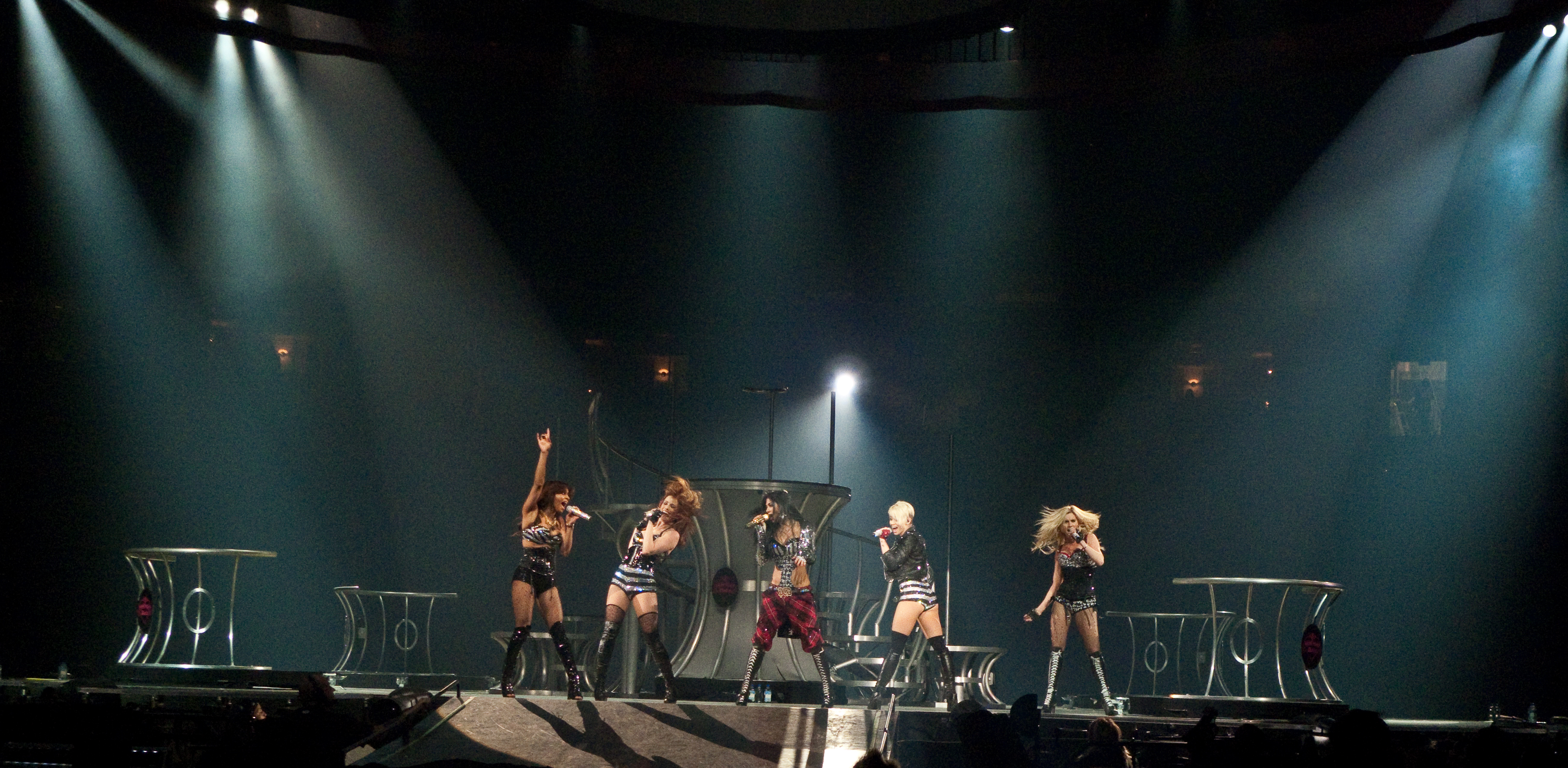 As Pussycat Dolls em apresentação em San Jose, Califórnia.